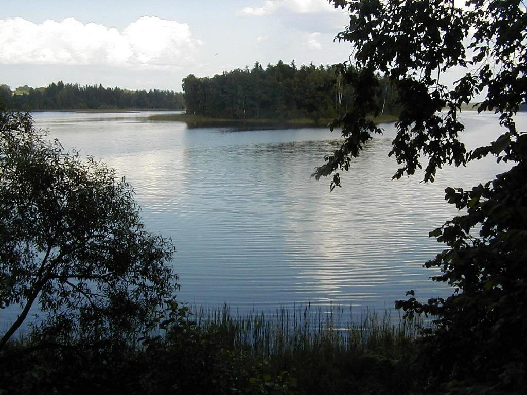 Adamovas ezers 2004-08-05